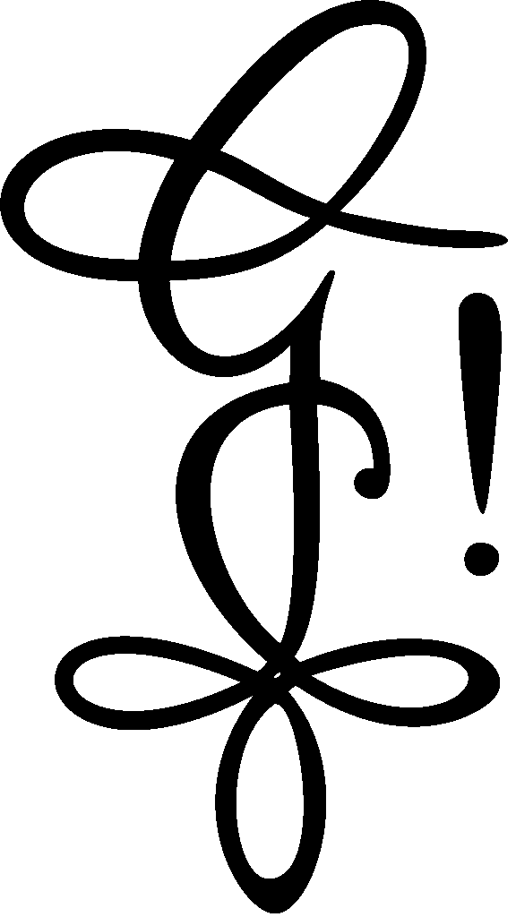 Zirkel der Alten Darmstädter Burschenschaft Germania